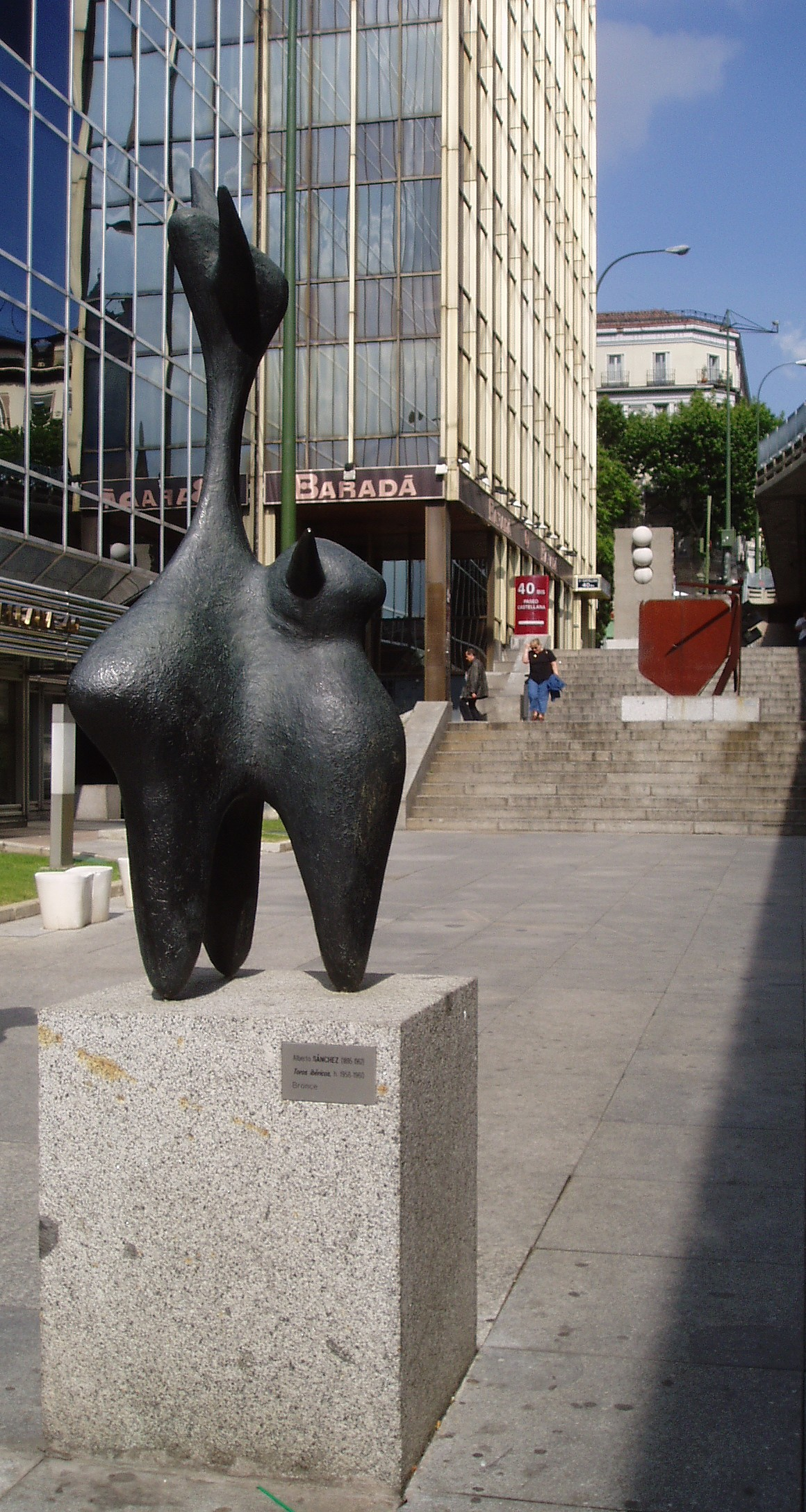 Toros Ibéricos. Alberto Sánchez. Museo Arte Público. Madrid. España